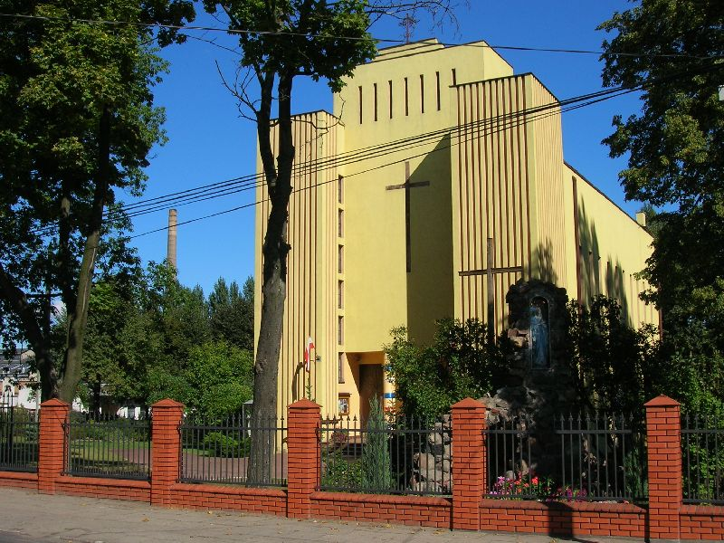 Kościół Świętegej Barbary w Głownie.